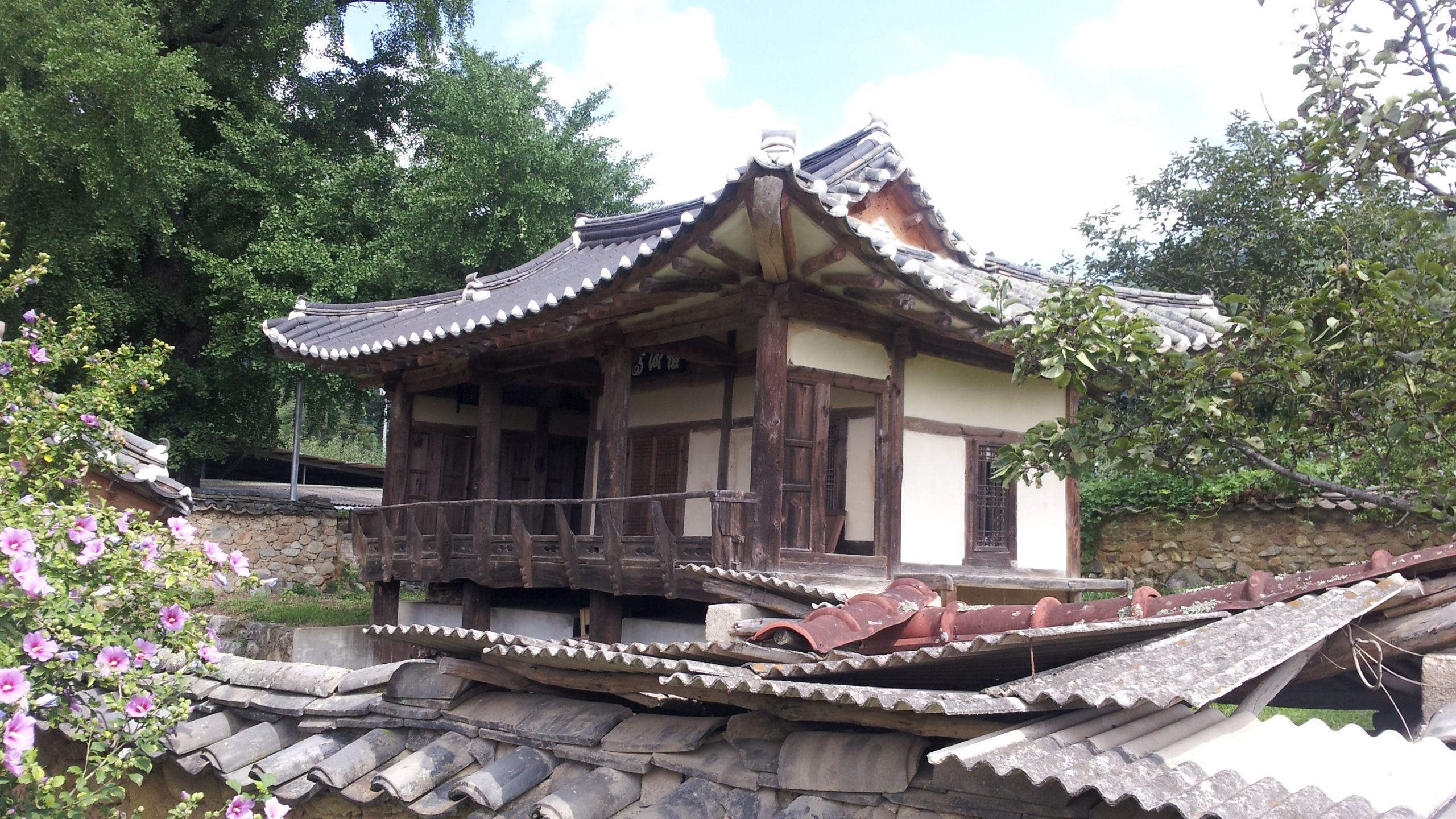 상주 문화재